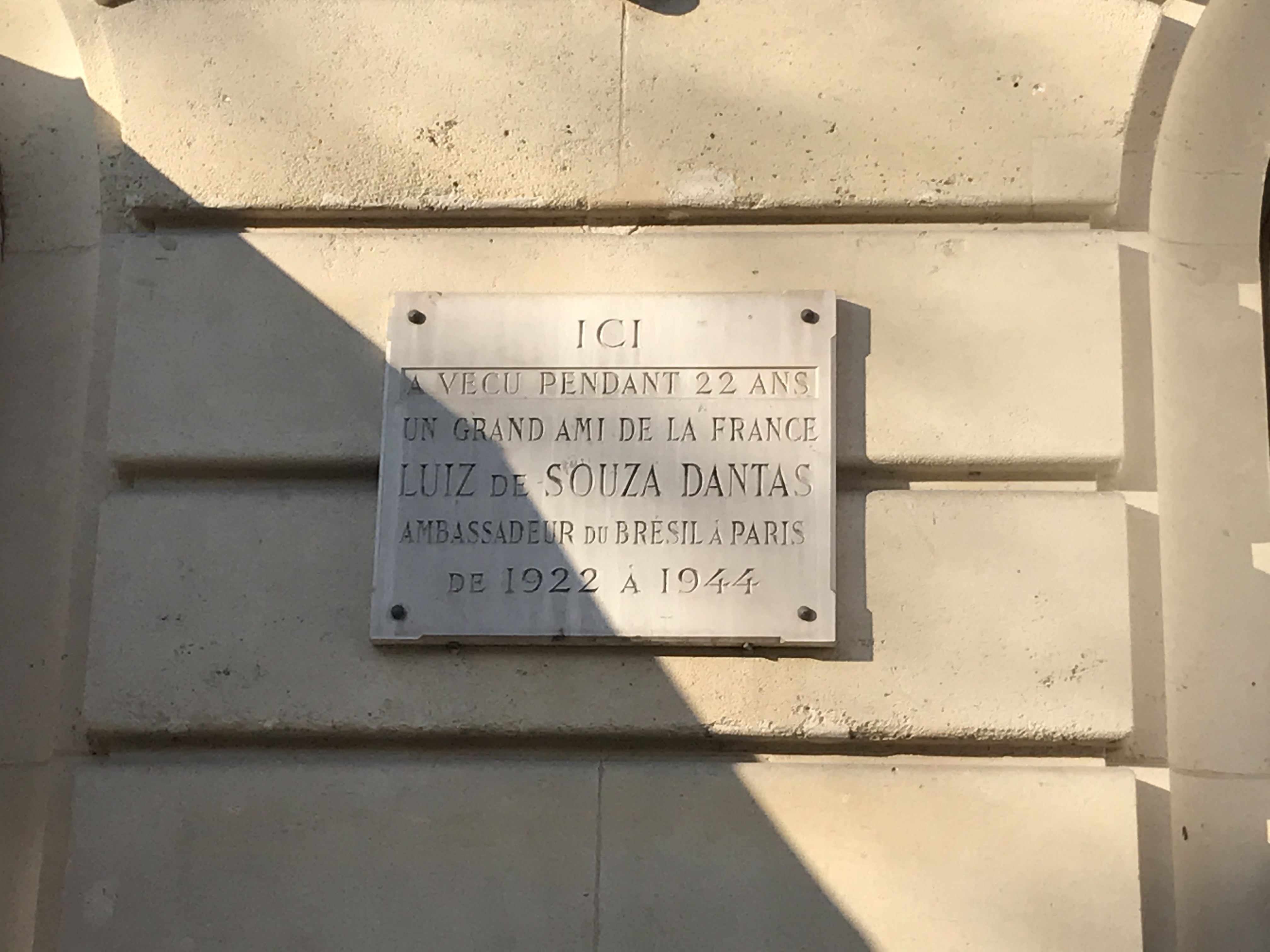 Plaque indiquant que Luís Martins de Sousa Dantas y a vécu située 45 avenue Montaigne à Paris.